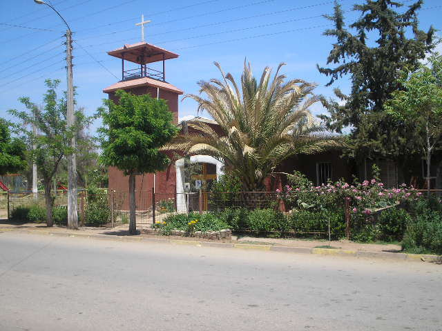 Iglecia de Rungue, Tiltil, Chile